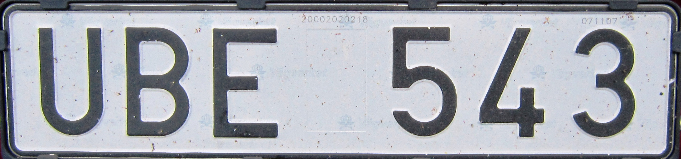 Zweden kenteken oud